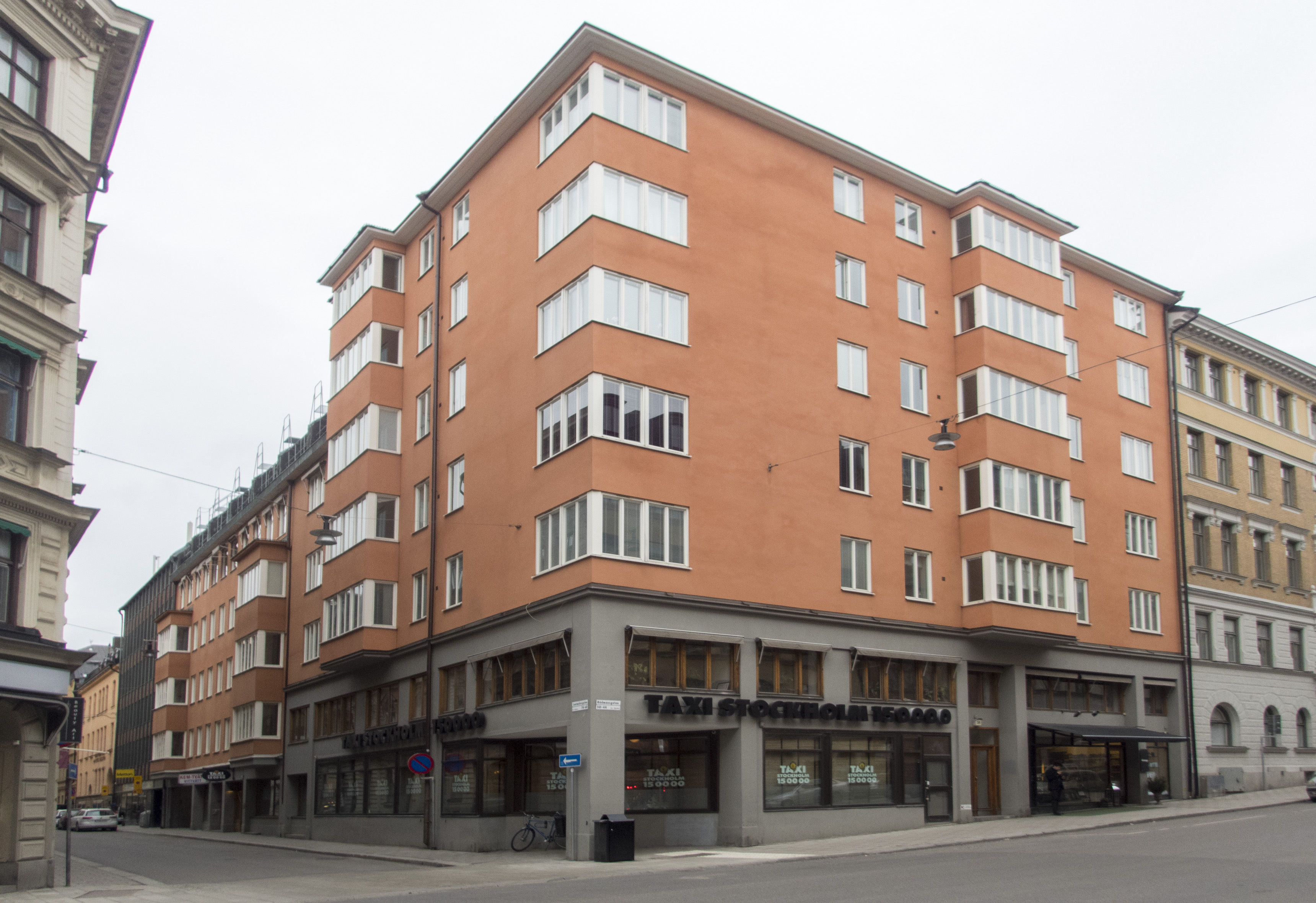 Sjöråen 25, Luntmakargatan 64, Rådmansgatan 48-50 Stockholm Nybyggnadsår 1931 - 1932 C. E. Hellstedt (Byggmästare) Droskägarnas Fastighets AB (Byggherre) Mauritz Dahlberg (Arkitekt)